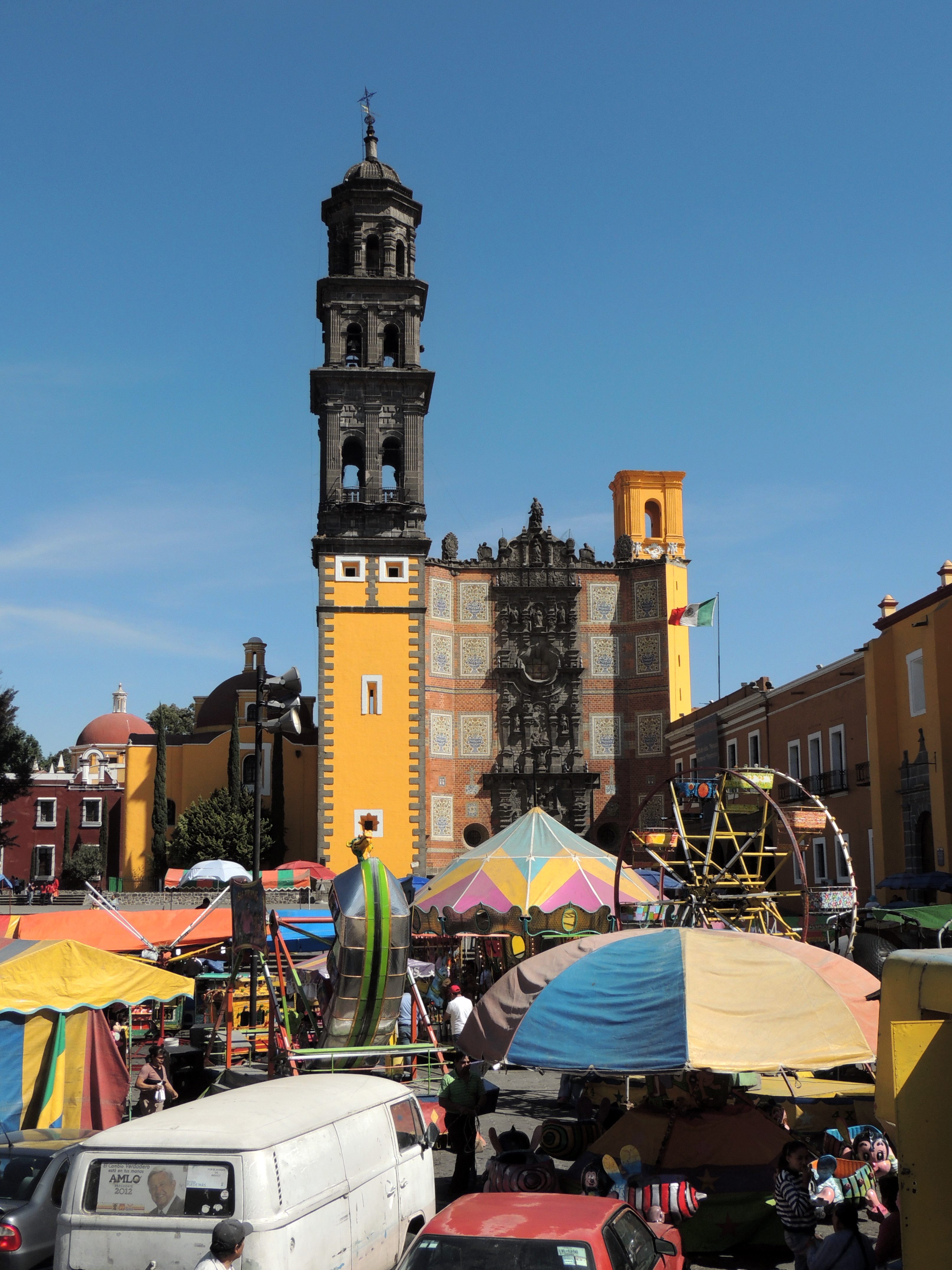 Templo de San Francisco Javier